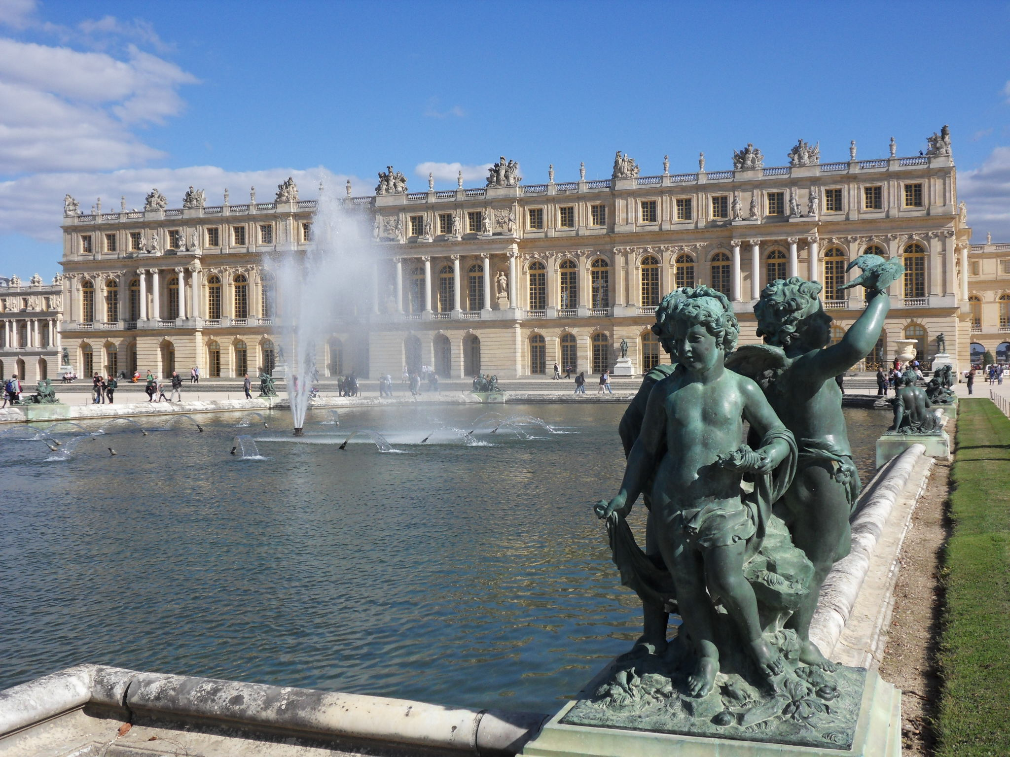 Château de Versailles — Le Parterre d’Eau. Décoration du bassin par une statue couchée figurant un fleuve ou une rivière de France : La Loire et le Loiret, Le Rhône et la Saône, La Seine et la Marne, La Garonne et la Dordogne. S'ajoutent à ces statues de bronze les statues de nymphes ou d'enfants. Bronze fondu par les frères Keller et placé sur la margelle d'un bassin du Parterre d'Eau des jardins de Versailles, façade ouest du château de Versailles